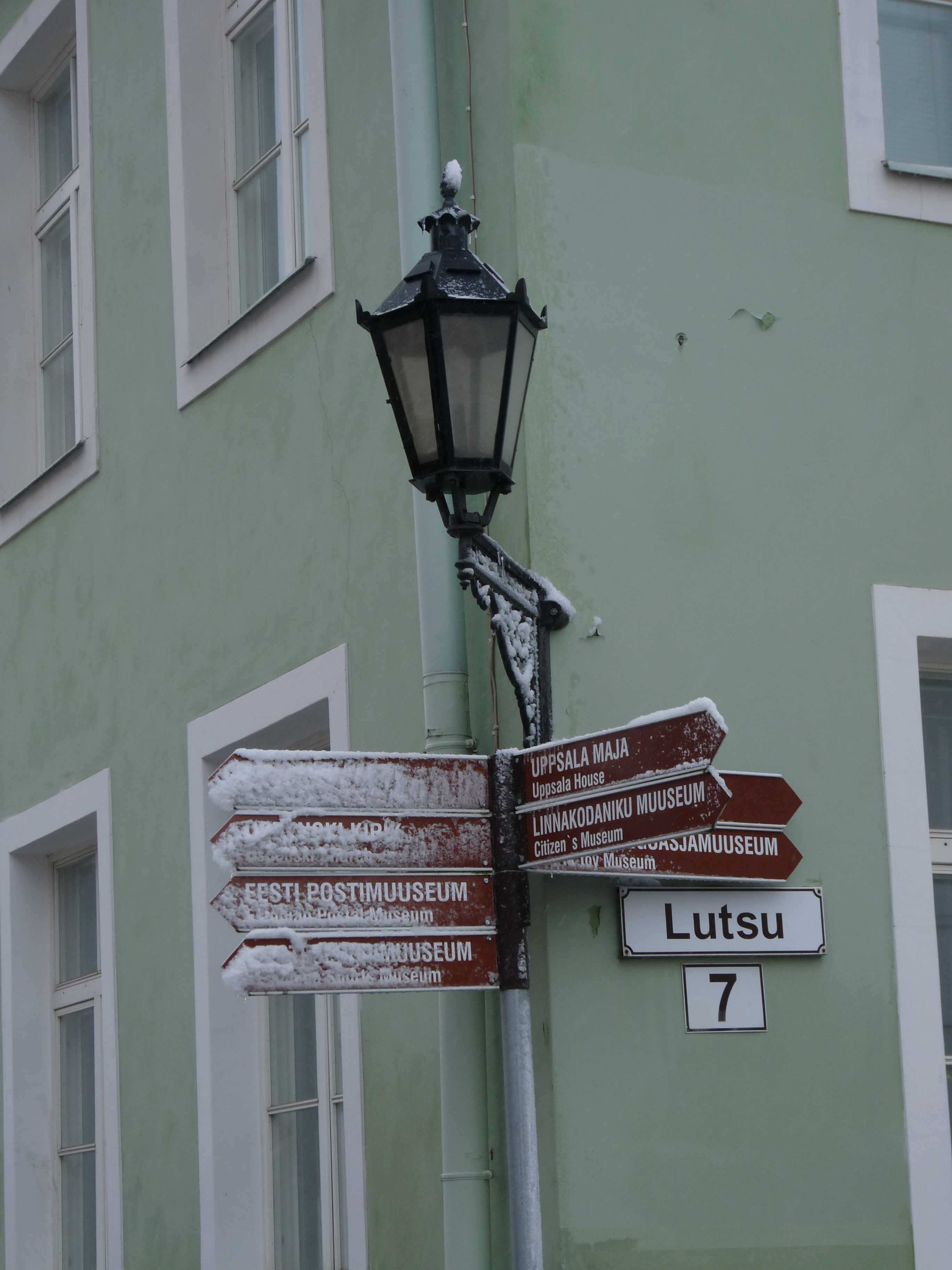 Esimene lumi peidab silte Tartus Lutsu ja Jaani tänava nurgal, 26. oktoober 2012